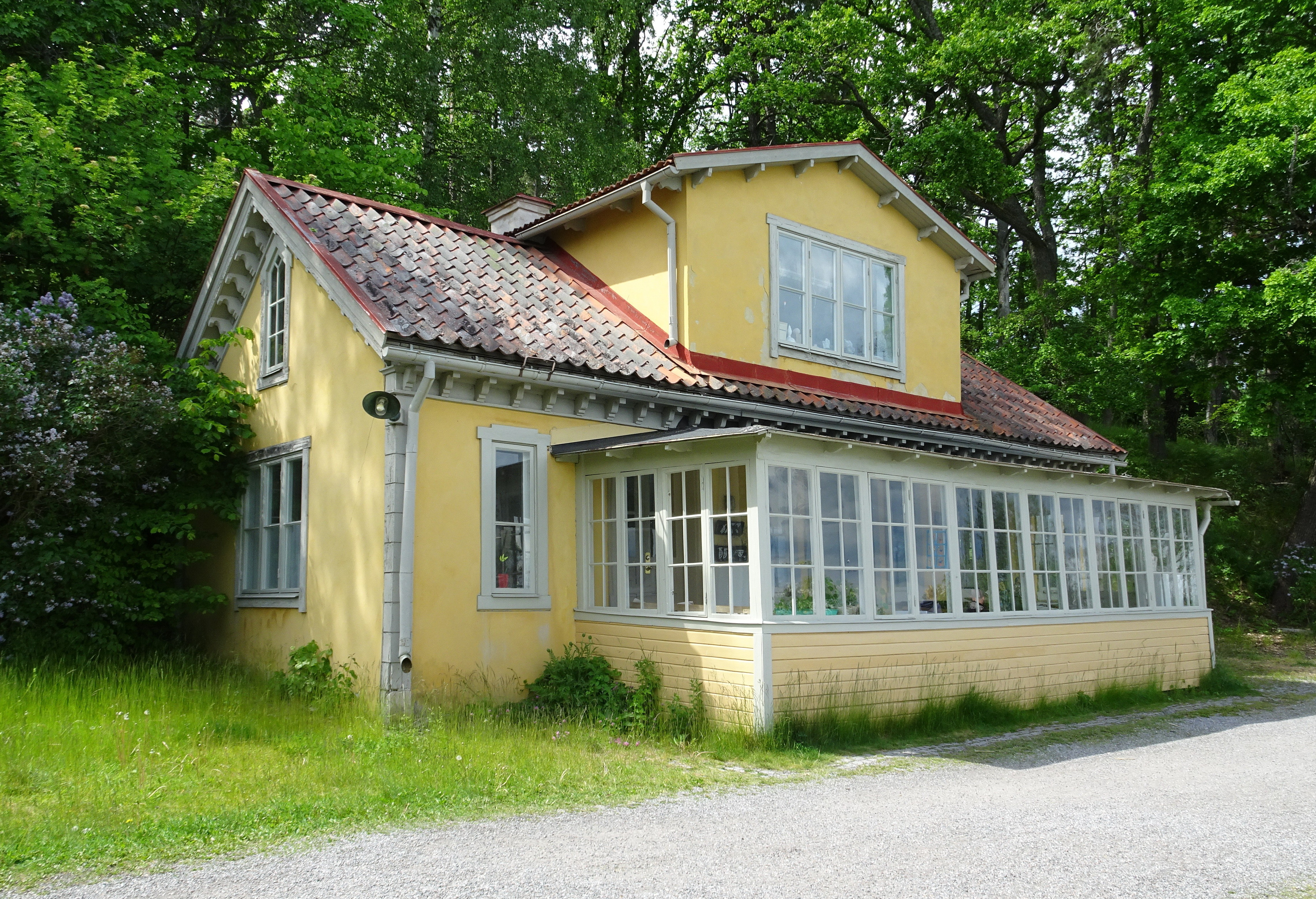 Ulriksdals före detta maskinhus, idag privatbostad